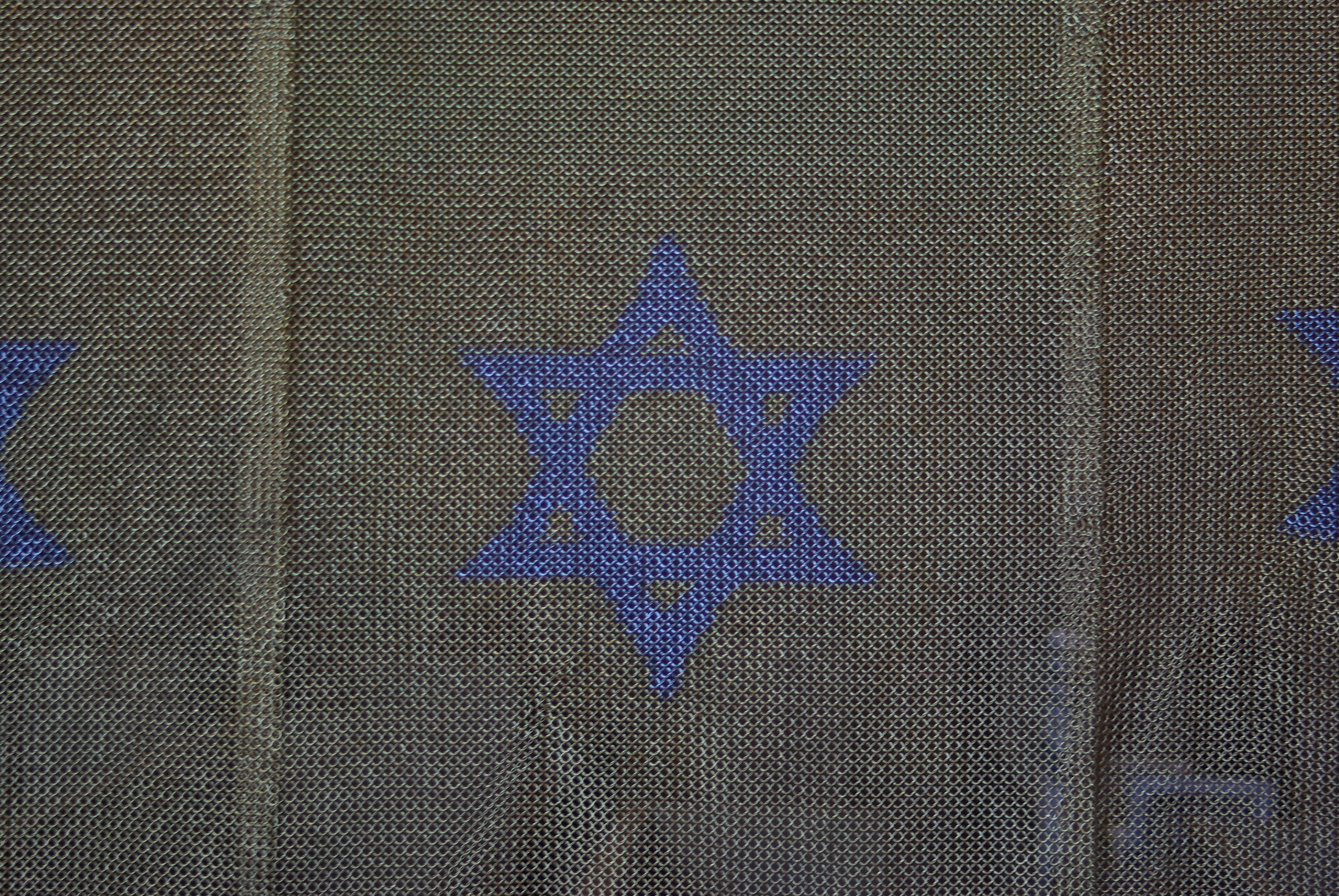 Von der Decke hängender Vorhang aus Metall, der den Gebetsraum umschließt